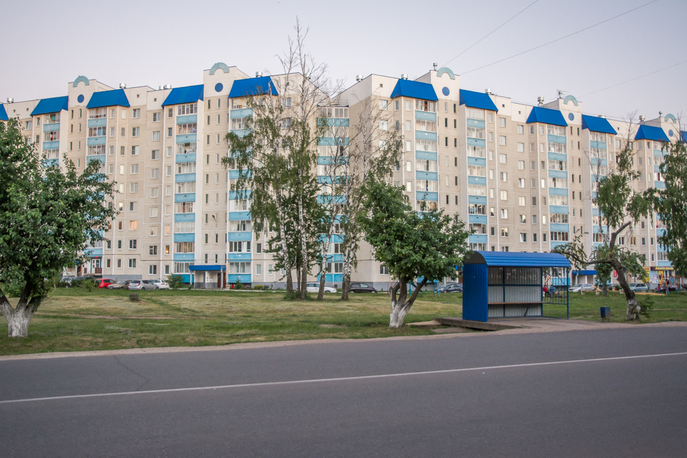 Новостройки в Районе "В"